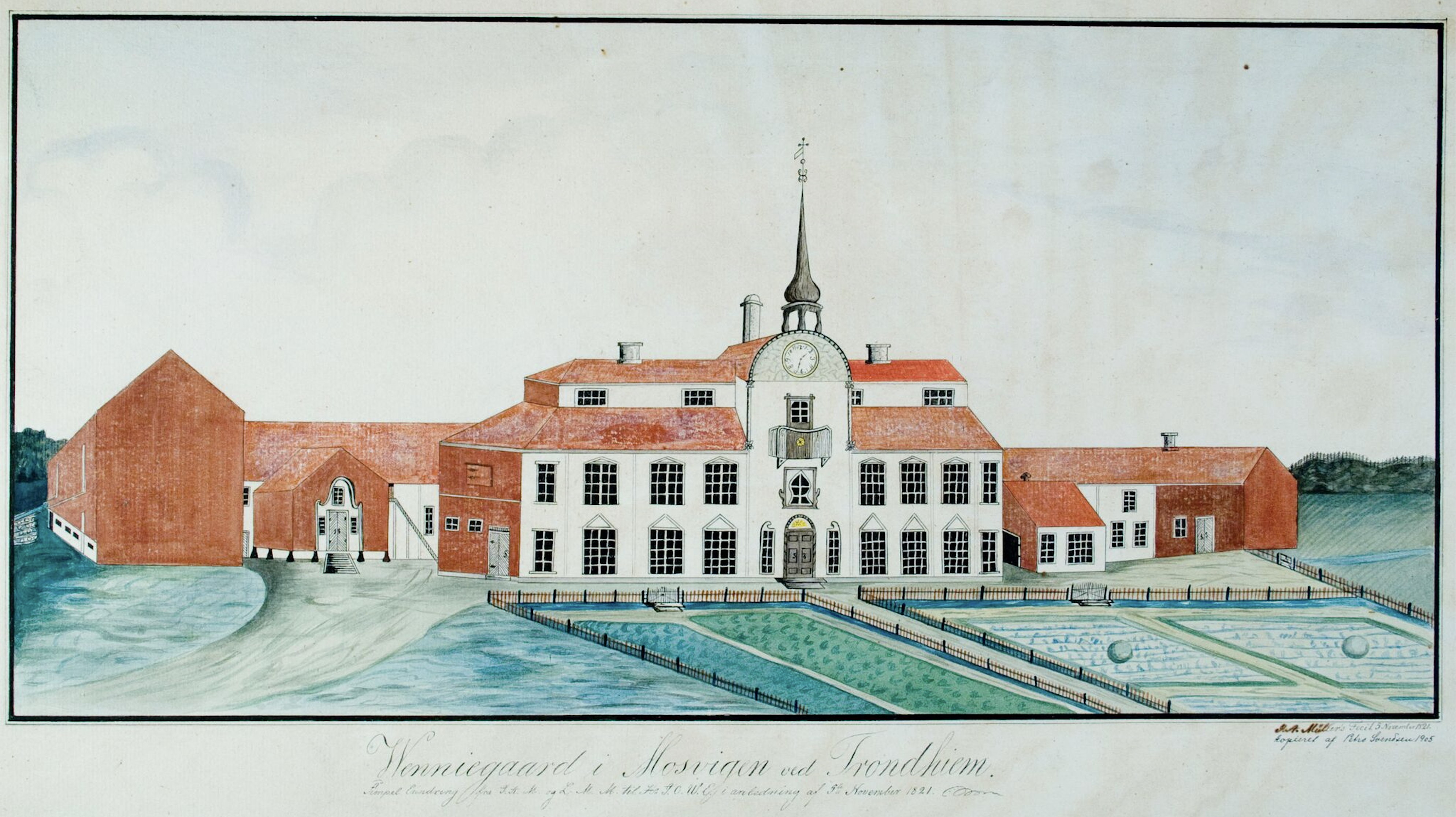 Hovedbygningen, våningshuset på Vinje bruk i Mosvik. Bygningen sto i perioden 1740–1890